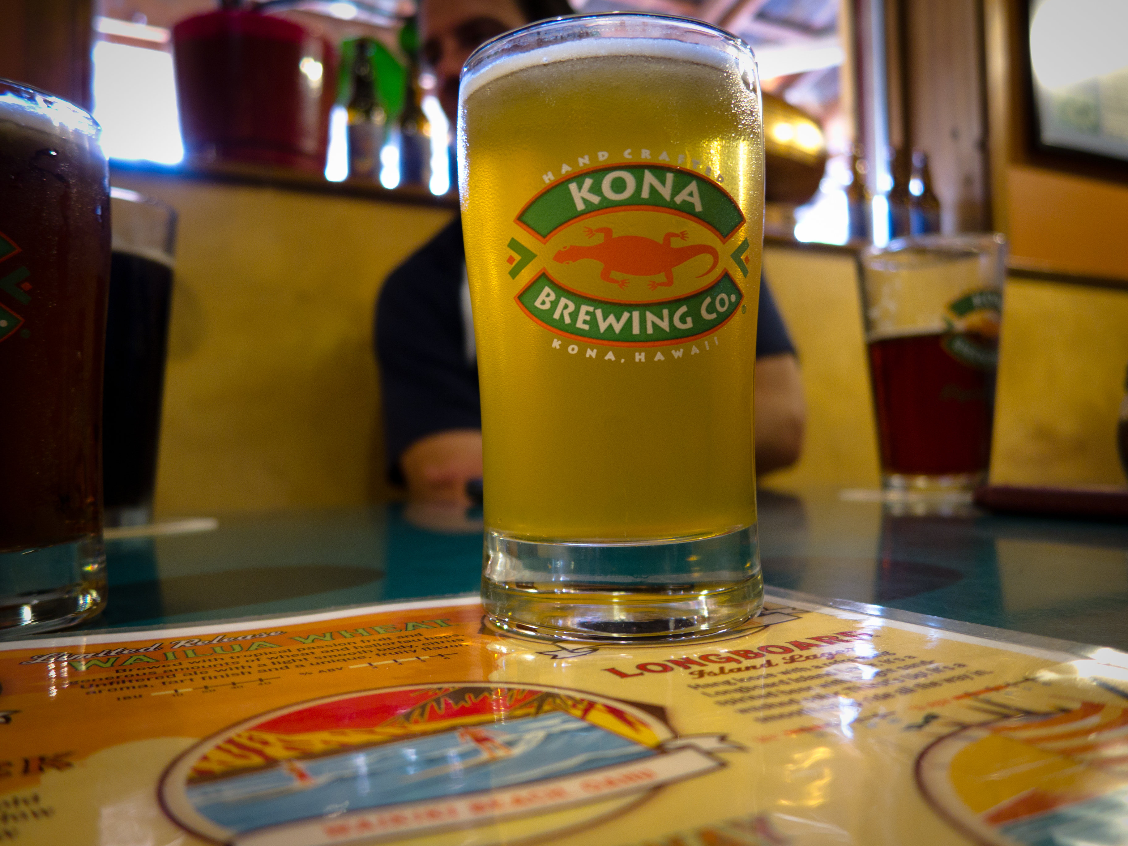 Kona Brewing Company lager